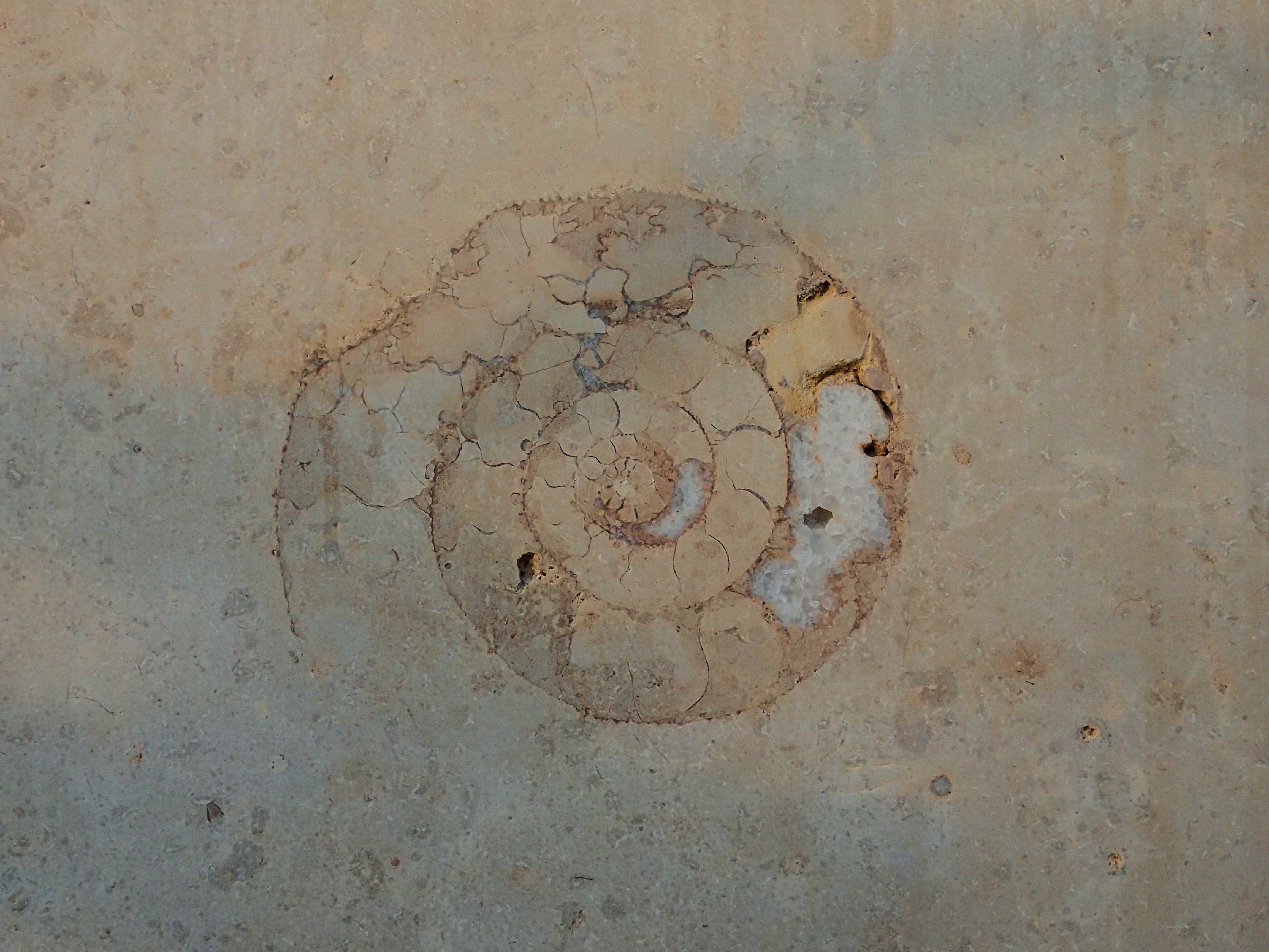 Meget velbevaret ammonit (ca 15 cm diameter) i 'Gelb Jura' facadesten på Operaen i København